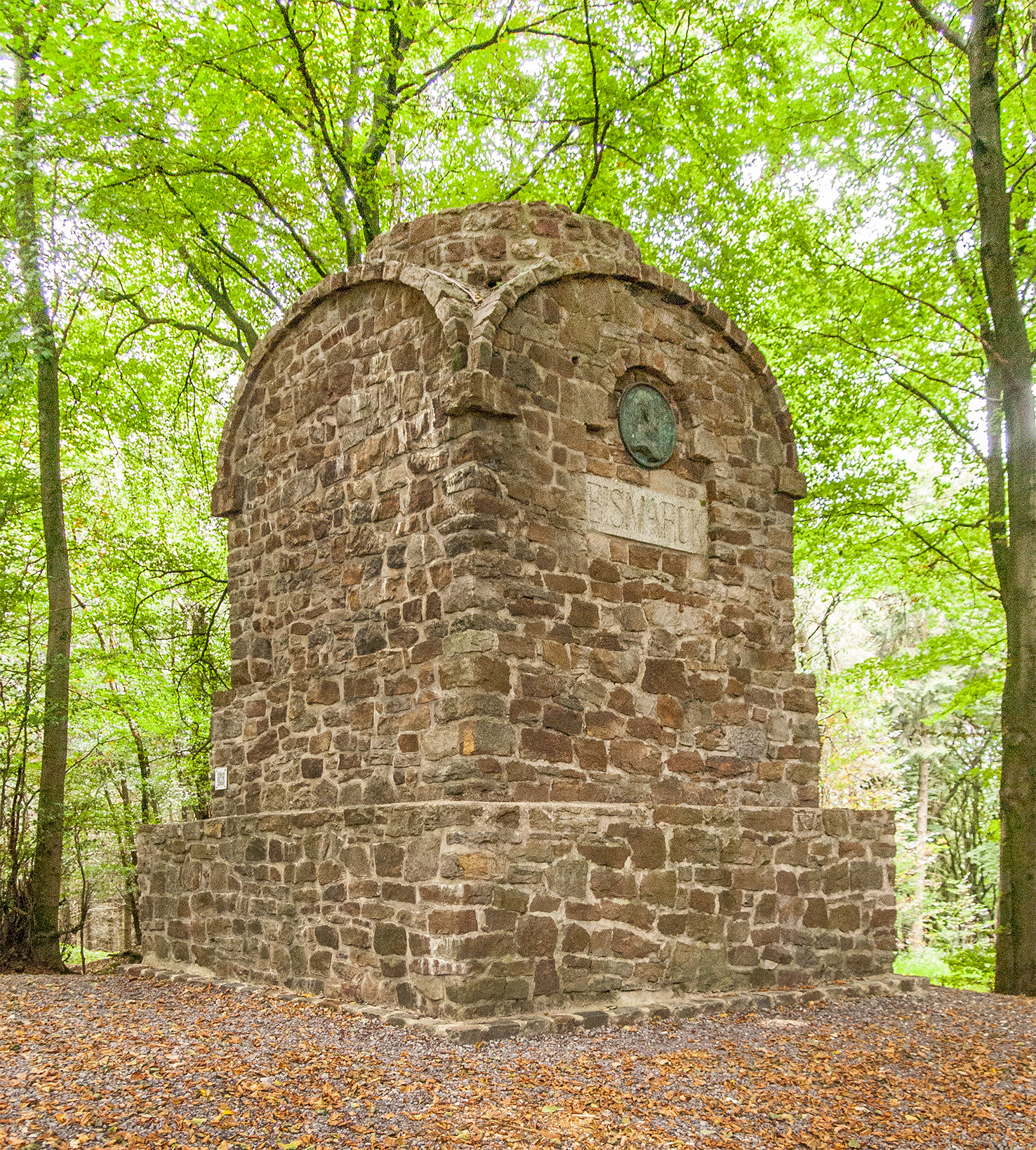 Bismarck-Feuersäule in der Nähe des Nonnensteins im Wiehengebirge bei Rödinghausen, Nordrhein-Westfalen.